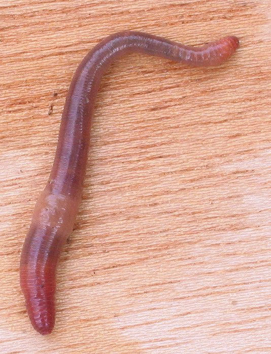 zelfgemaakte foto van volwassen mestpier; half november